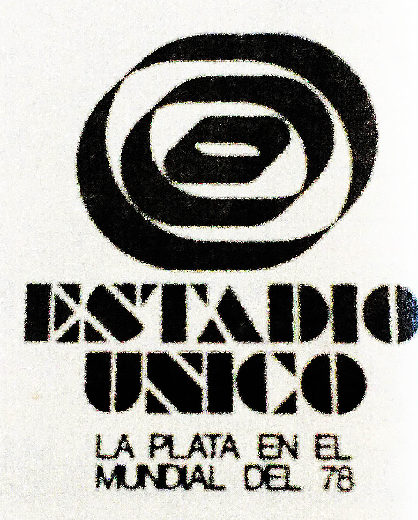 Fotografía del logo ganador del concurso de diseño para la pre-candidatura del Estadio Único (hoy, Ciudad de La Plata) como sede del Mundial de Fútbol 1978.